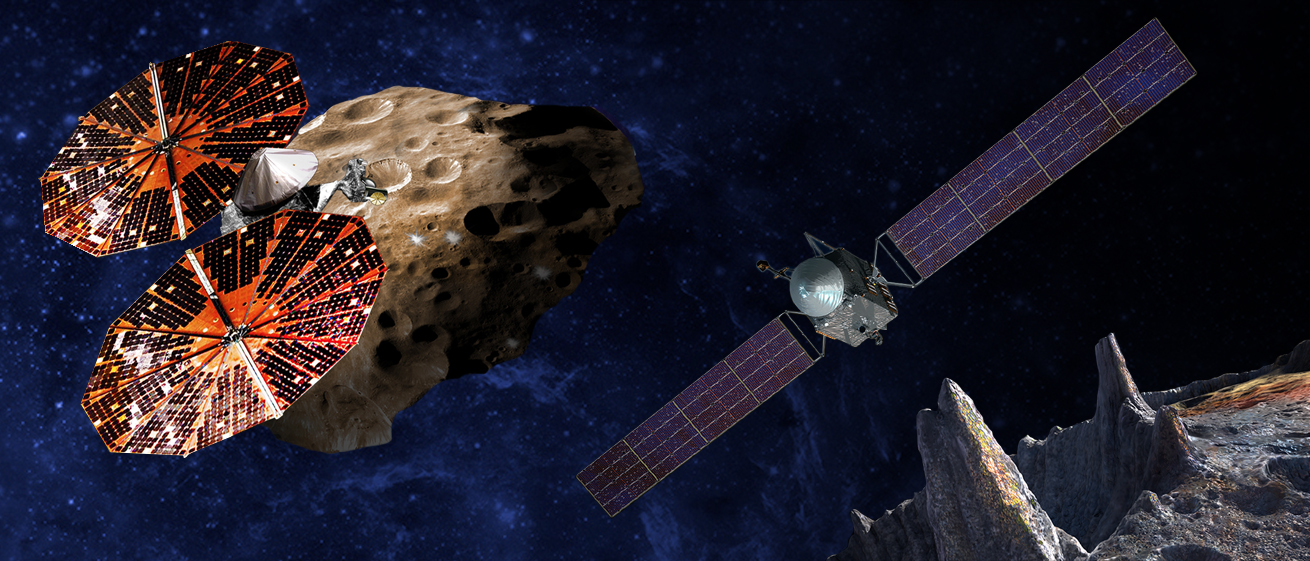 Mission Lucy et Psyche du programme Discovery de la NASA. Vue d'artiste